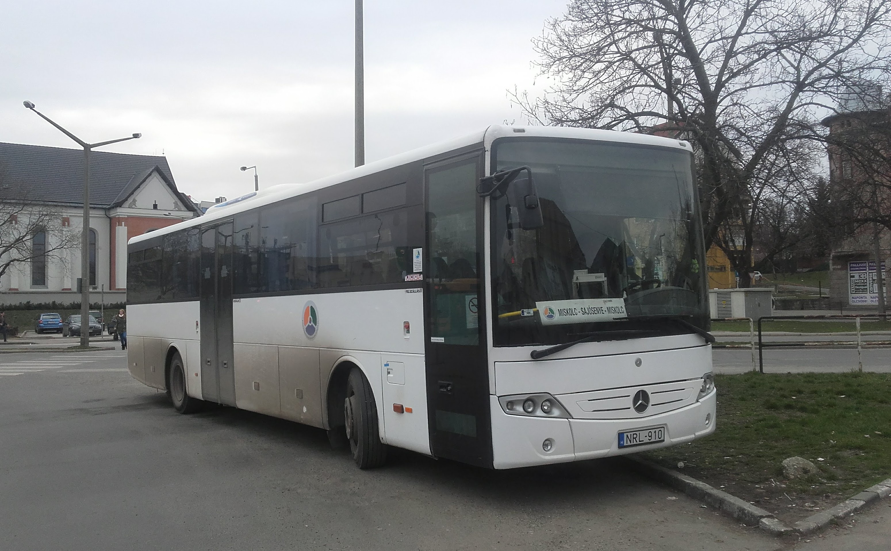 Az ÉMKK NRL-910 rendszámú Mercedes Intouro busza Miskolcon, a 3705-ös helyközi járaton.